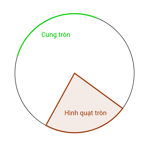 Cung tròn và hình quạt tròn